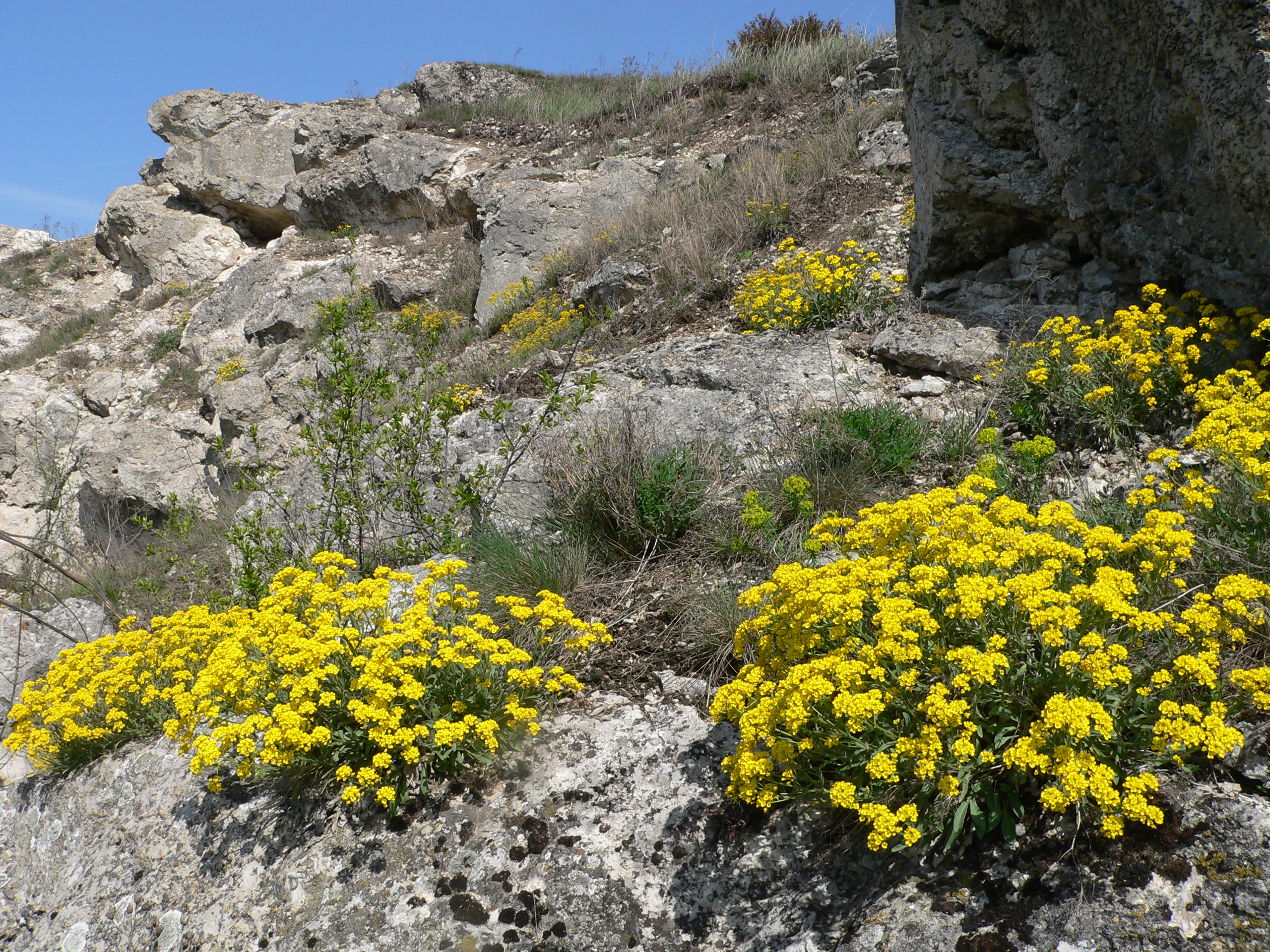 Наскельні угрупування рослин у заповіднику